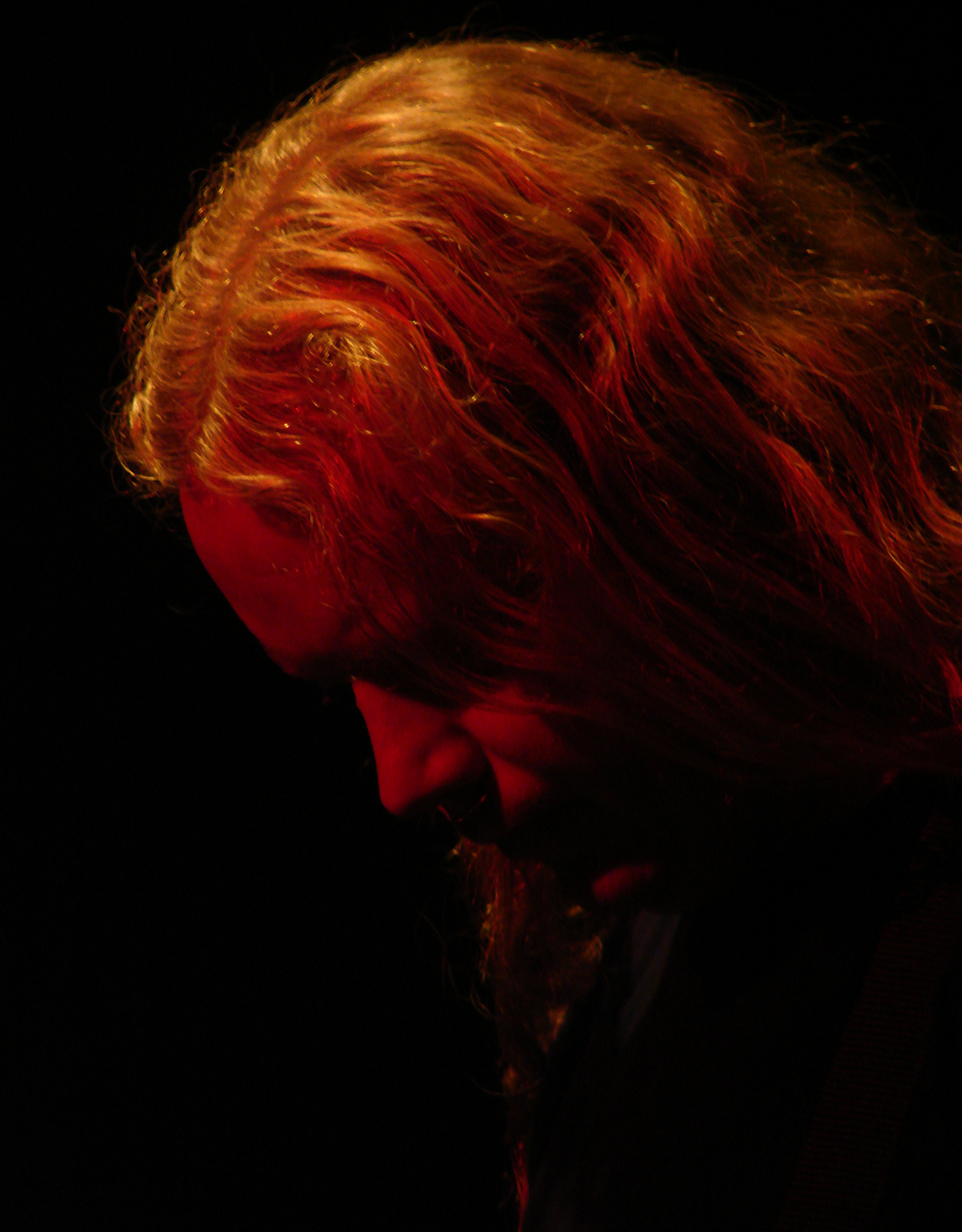 Primordial en concert à la Locomotive, à Paris, pendant le Heidenfest Tour 2008.